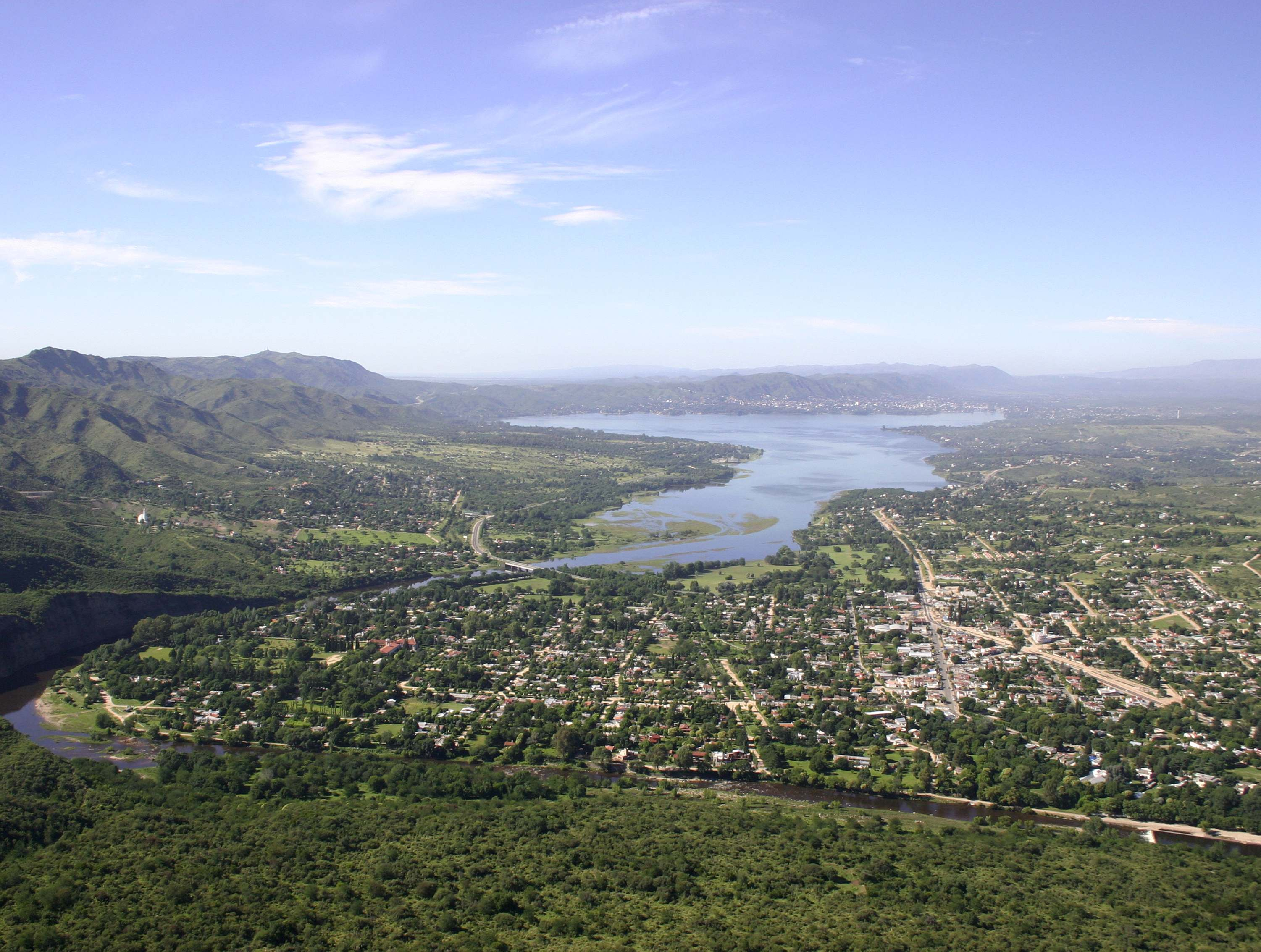 Bialet Massé, Provincia de Córdoba, Argentina